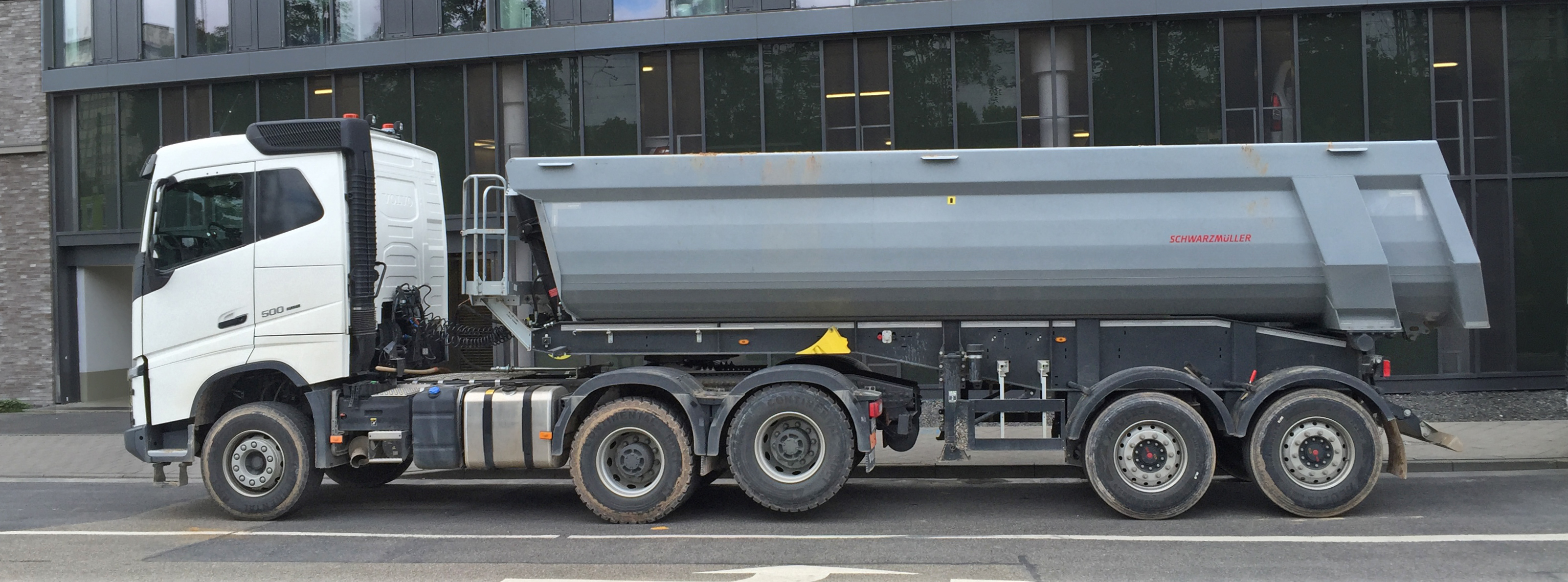 Bildinhalt: Ein Sattelzug mit angehobener Liftachse an der Zugmaschine Aufnahmeort: Frankfurt am Main, Deutschland